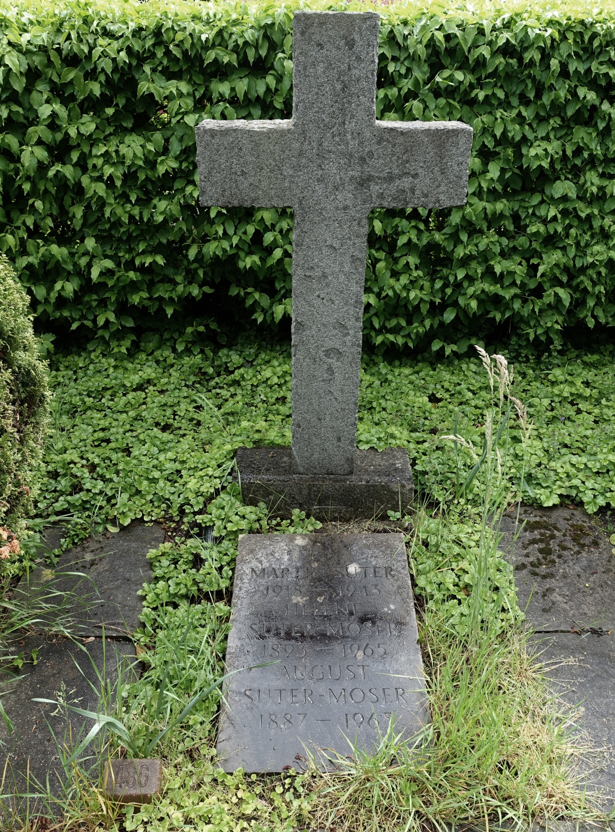 August Suter (1887–1965) Bildhauer. Familiengrab auf dem Friedhof am Hörnli, Basel